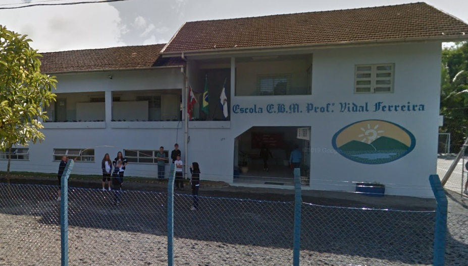 EBM Vidal Ferreira